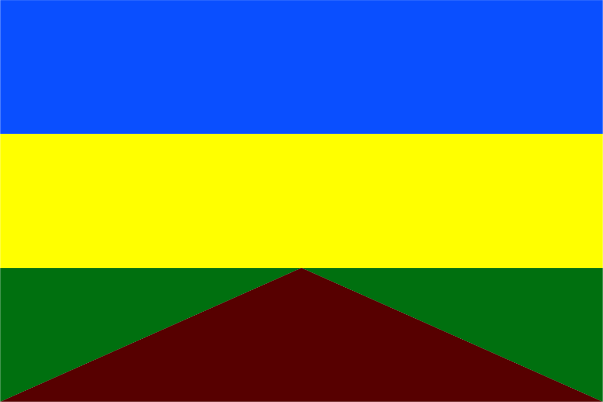 Bandera del Distrito de Tumán - Provincia de Chiclayo - Región Lambayeque